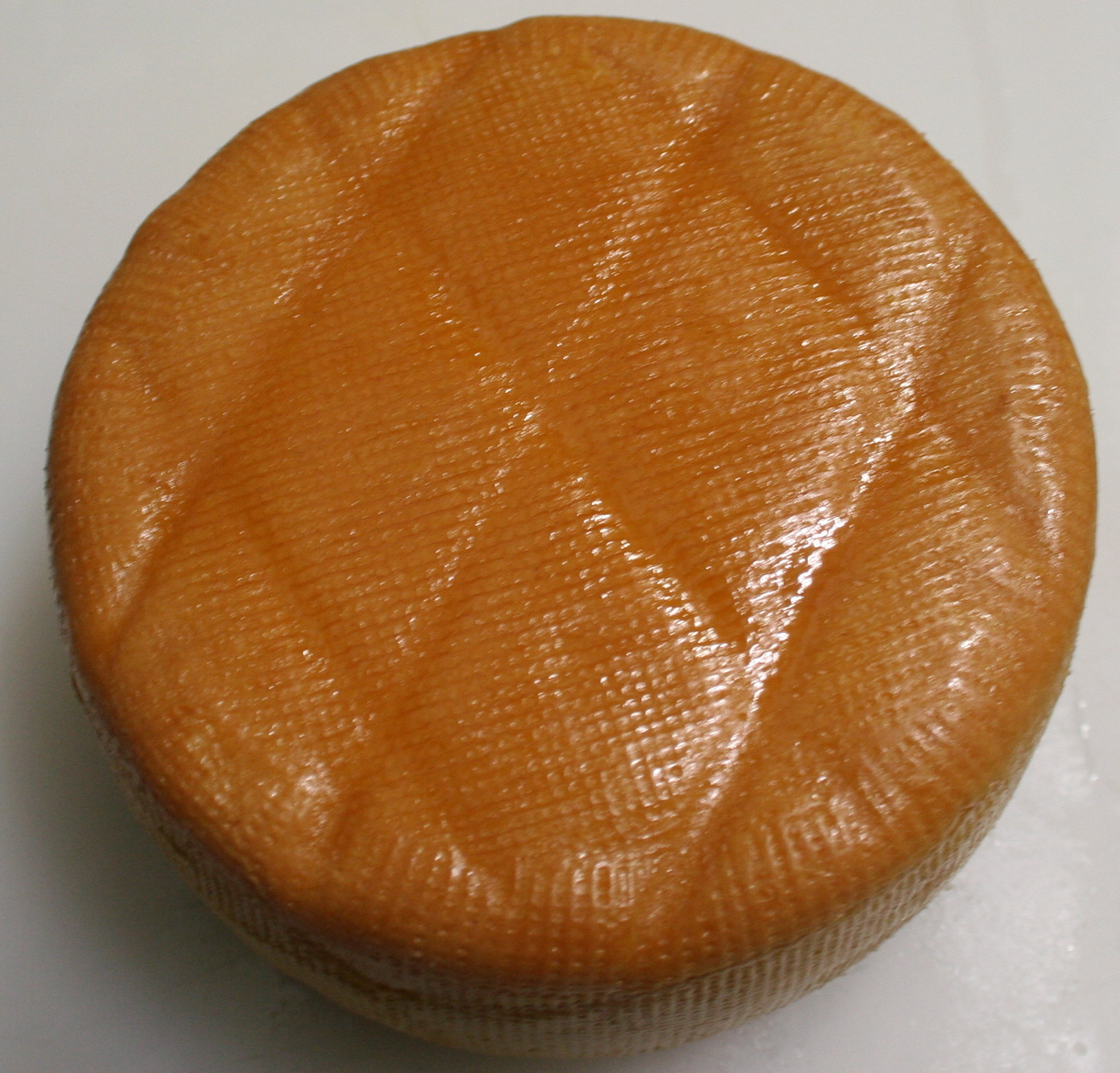 Queso ahumado de Pría de Asturias, desembalado pero intacto